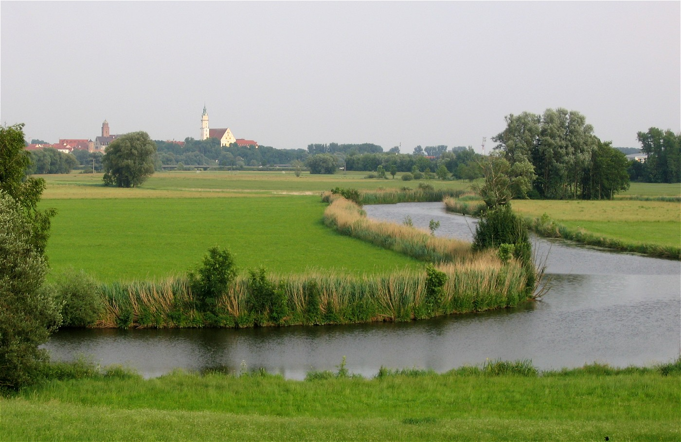 Wörnitz bei Donauwörth